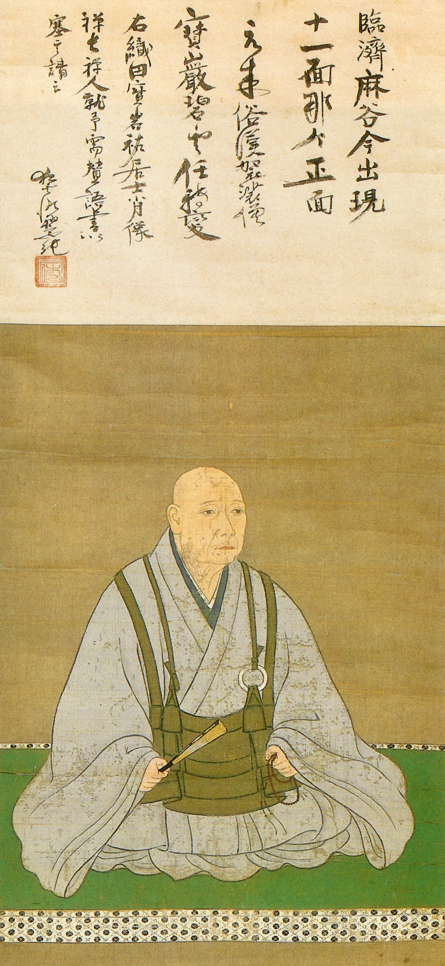 織田宝岩祐居士の肖像。織田久長の肖像か。